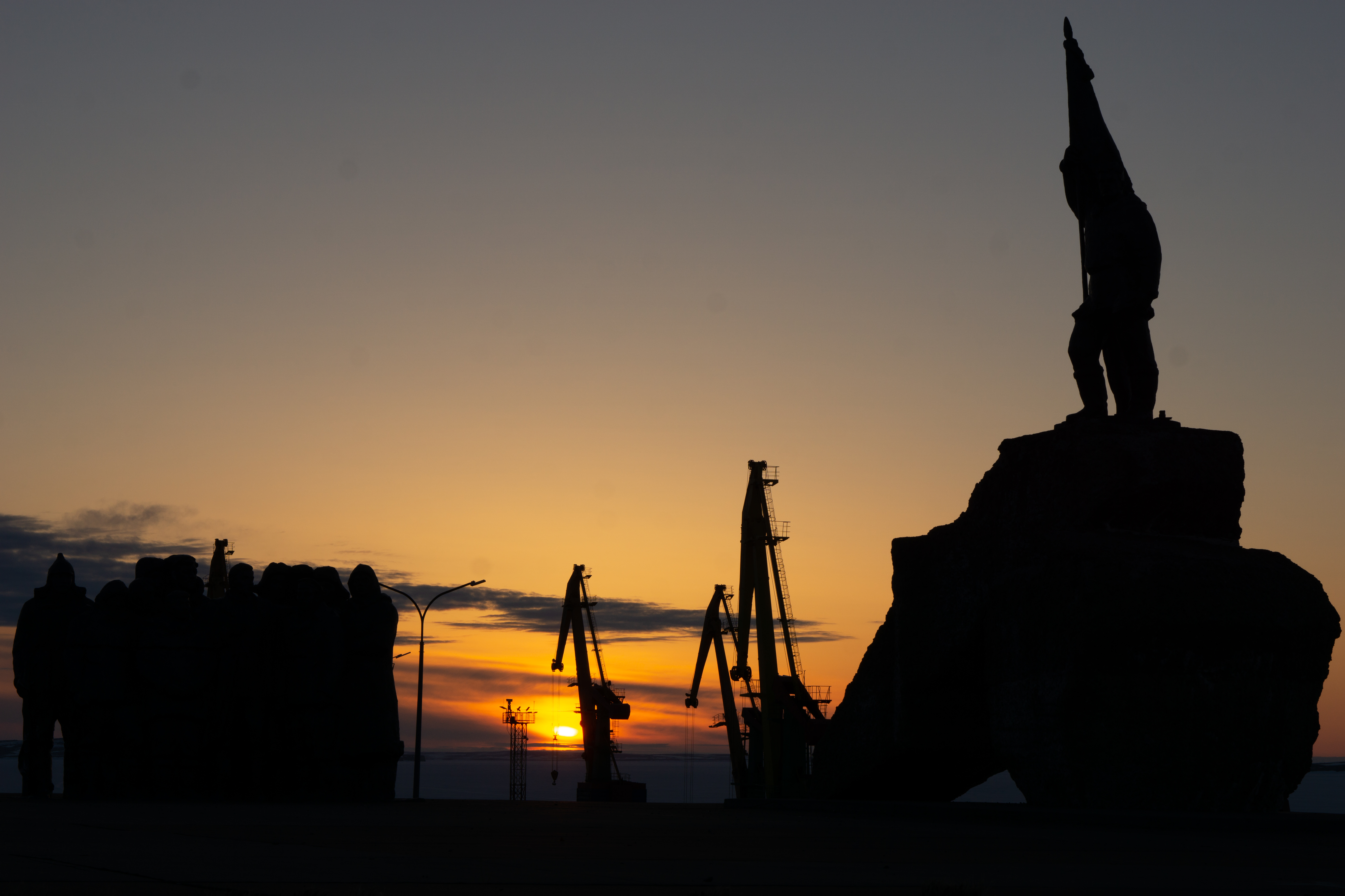 фото мандрикова на закате 2019